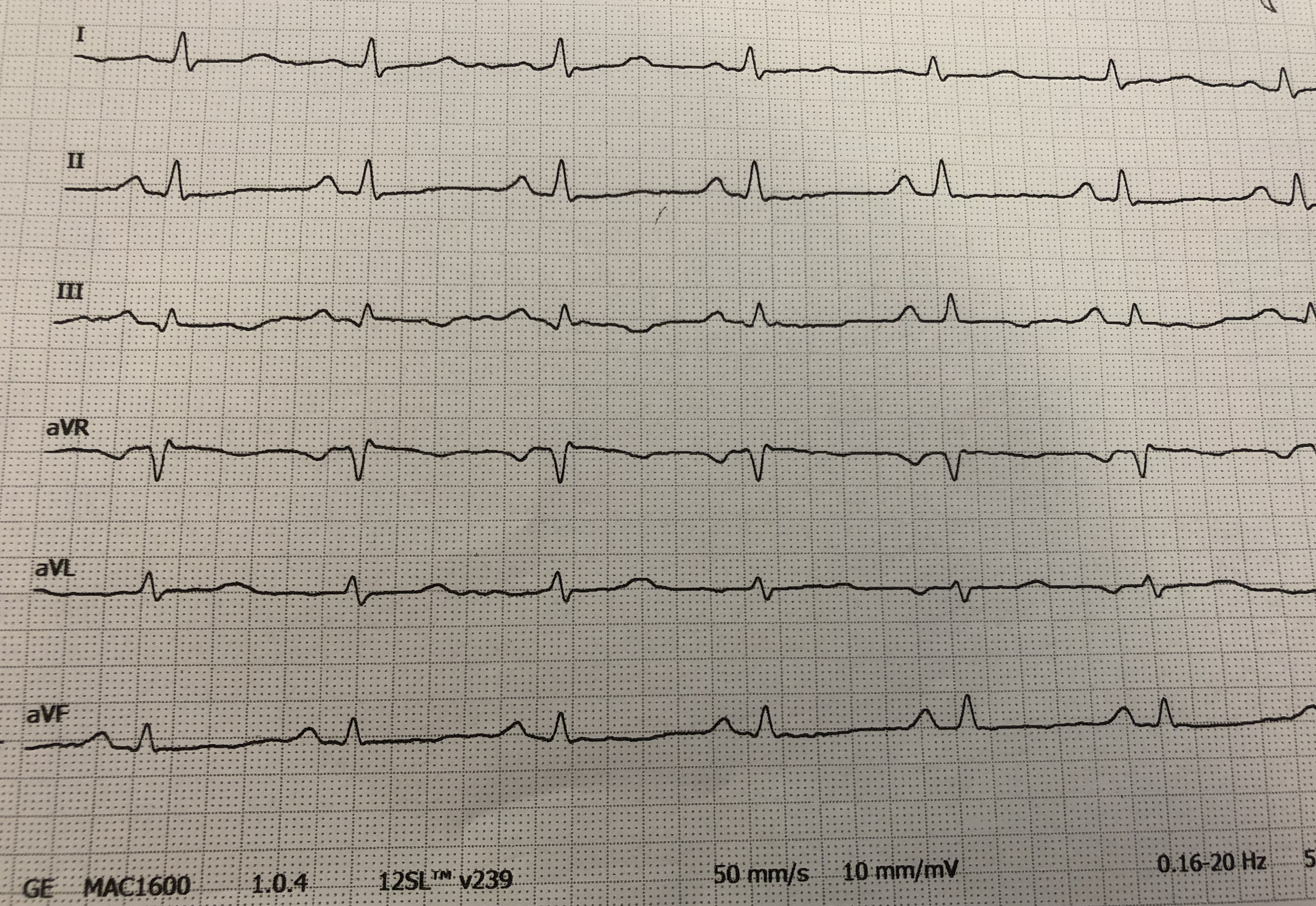 P-dextroatriale bei einer Patientin mit akuter Lungenembolie mit akuter Rechtsherzbelastung